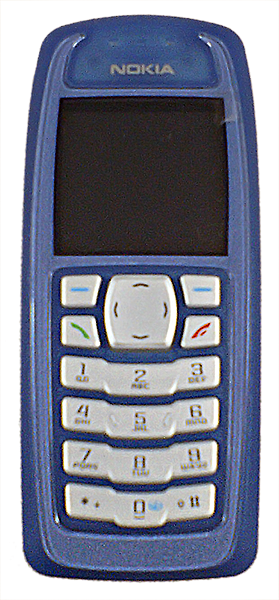 Nokia 3100 mobile phone